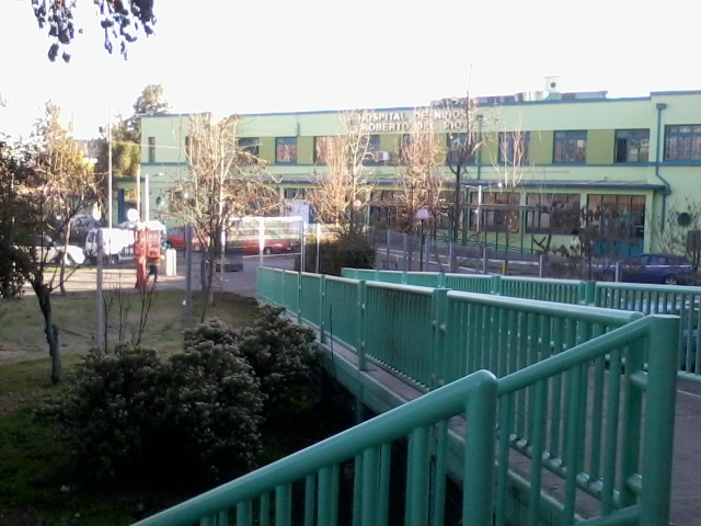 Frontis del Hospital de Niños Roberto del Río,Santiago,Chile.